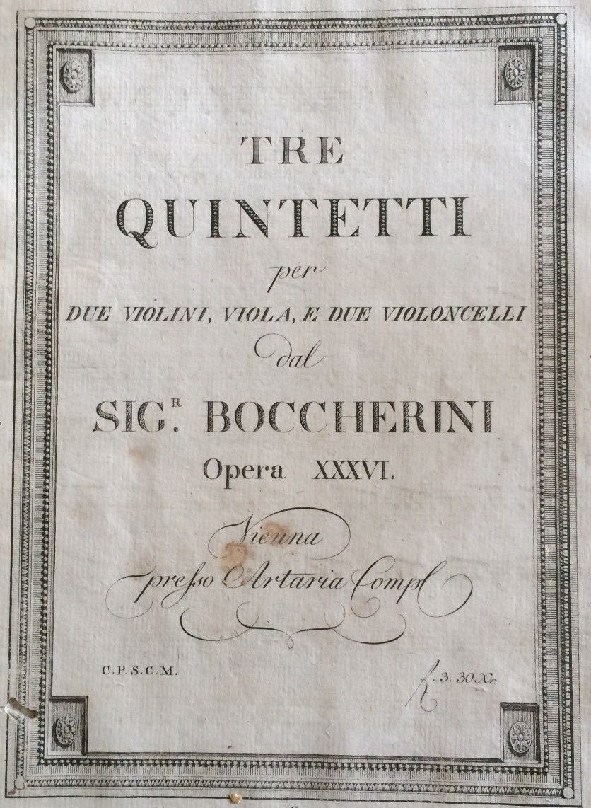 Frontispice de l'édition Artaria de Vienne de 1784 des trois premiers quintettes à cordes op.25 (G.295, 296, 297).